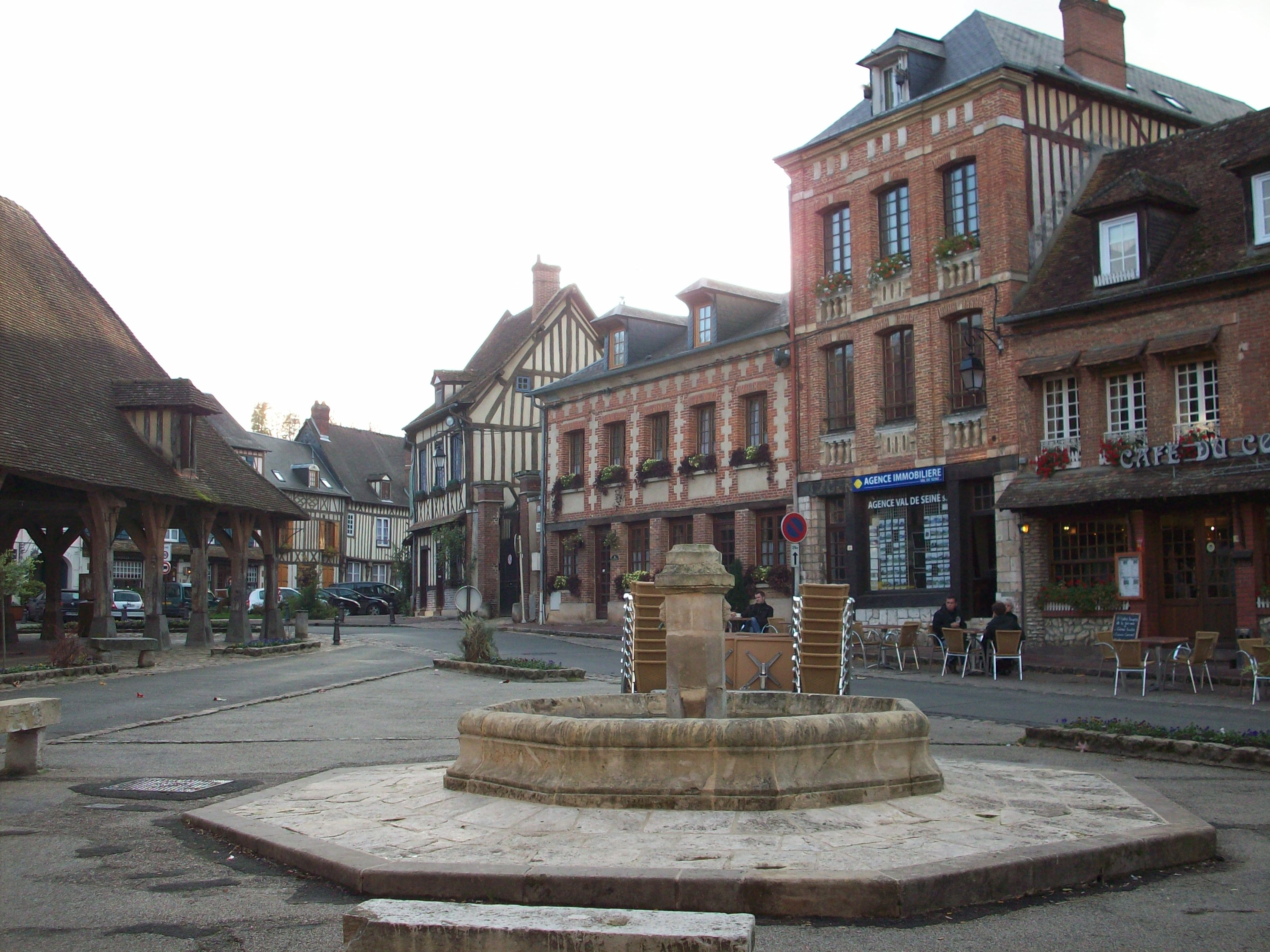 Place et la fontaine de Lyons-la-Forêt.